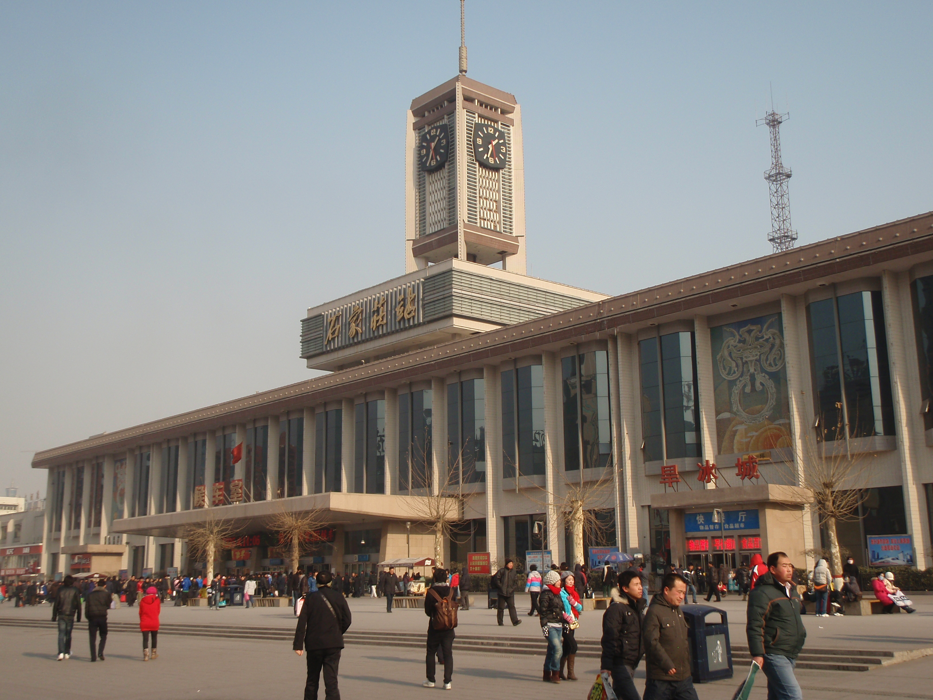 石家庄火车站